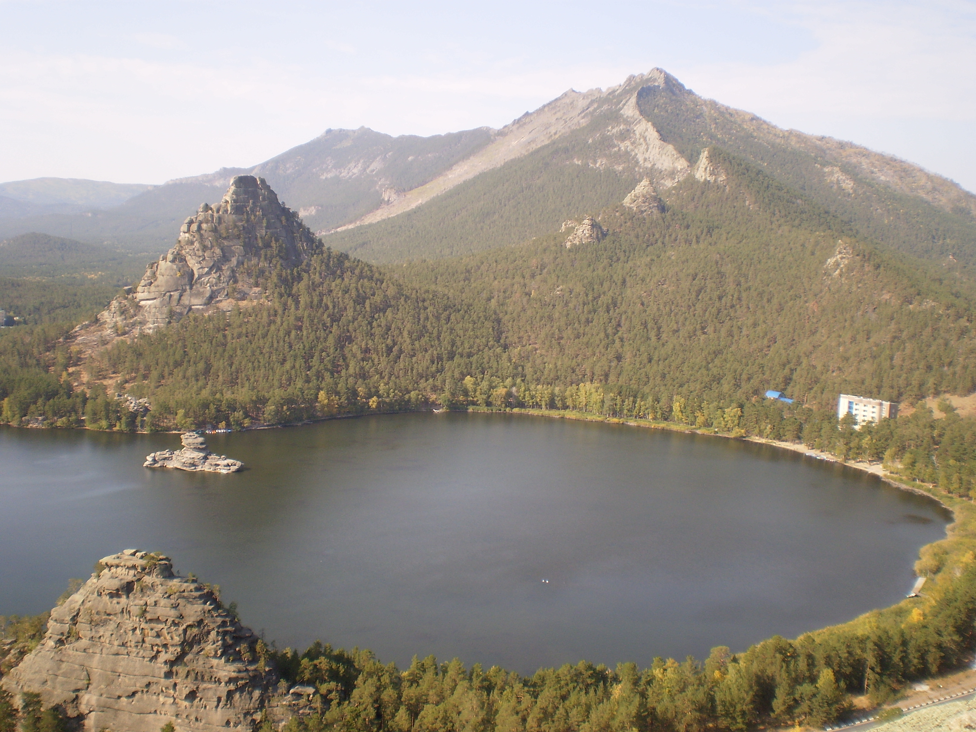 Курорт Боровое